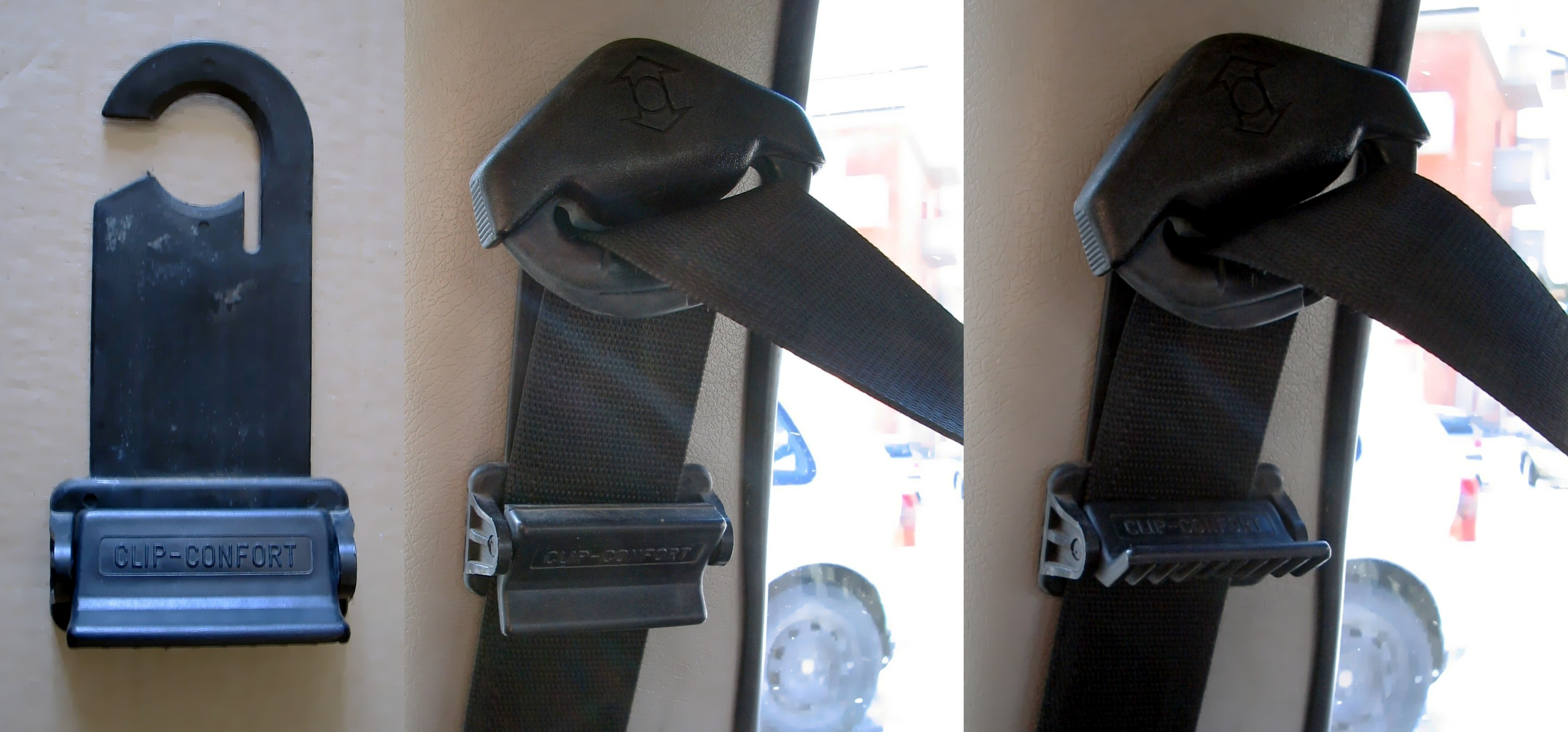 Clip confort, a sinistra non è montato, al centro è montato ma non usato, a destra è montato e usato ed è possibile vedere come la cintura sia meno tesa rispetto al suo non utilizzo, dato che permette di regolare la tensione della cintura e poi bloccarla